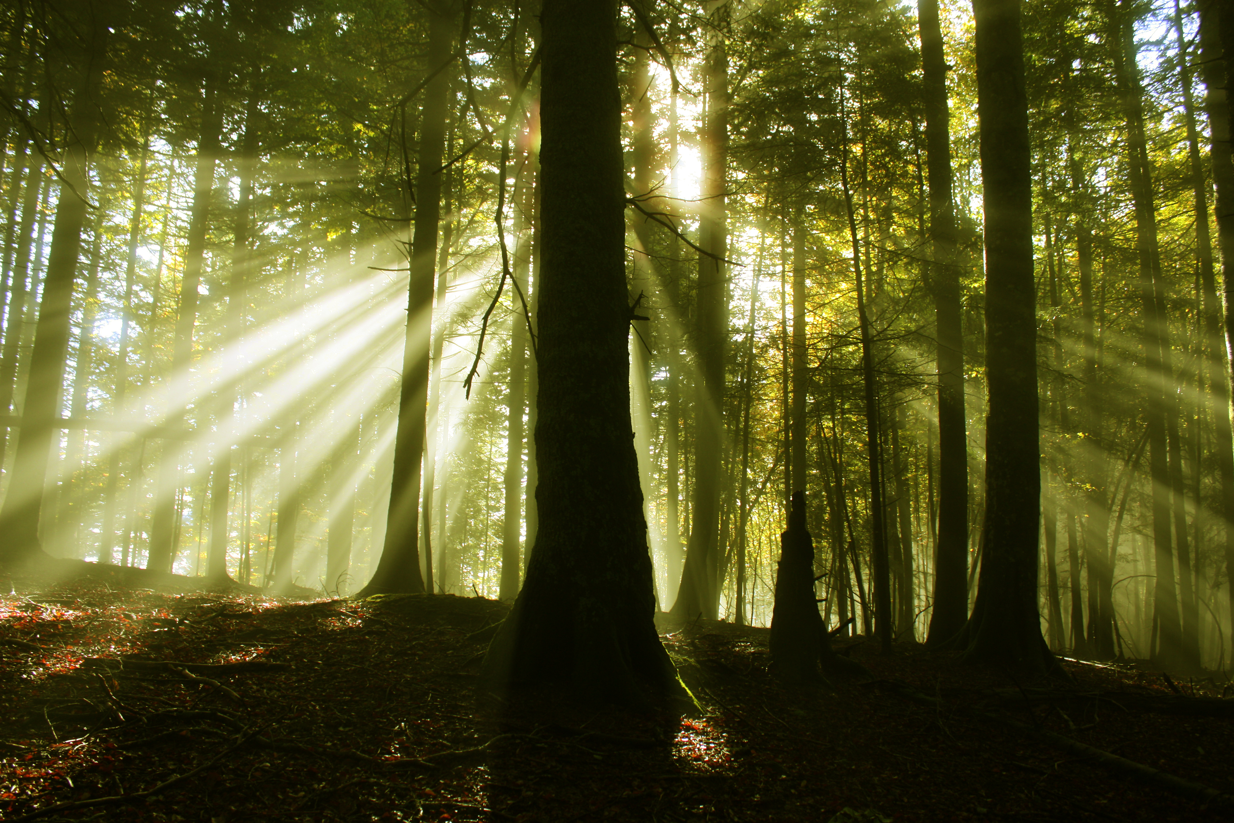 Monte Lizardoia, Selva de Irati, Navarra. El monte Lizardoia se encuentra dentro de el bosque o selva de Irati, en Navarra. Todo el bosque goza de protección, pero el monte Lizardoia goza de protección especial al no haber sido nunca explotado o manipulado por el ser humano. This is a photography of a Site of Community Importance in Spain with the ID: ES0000126. Natura2000 entry, EEA entry